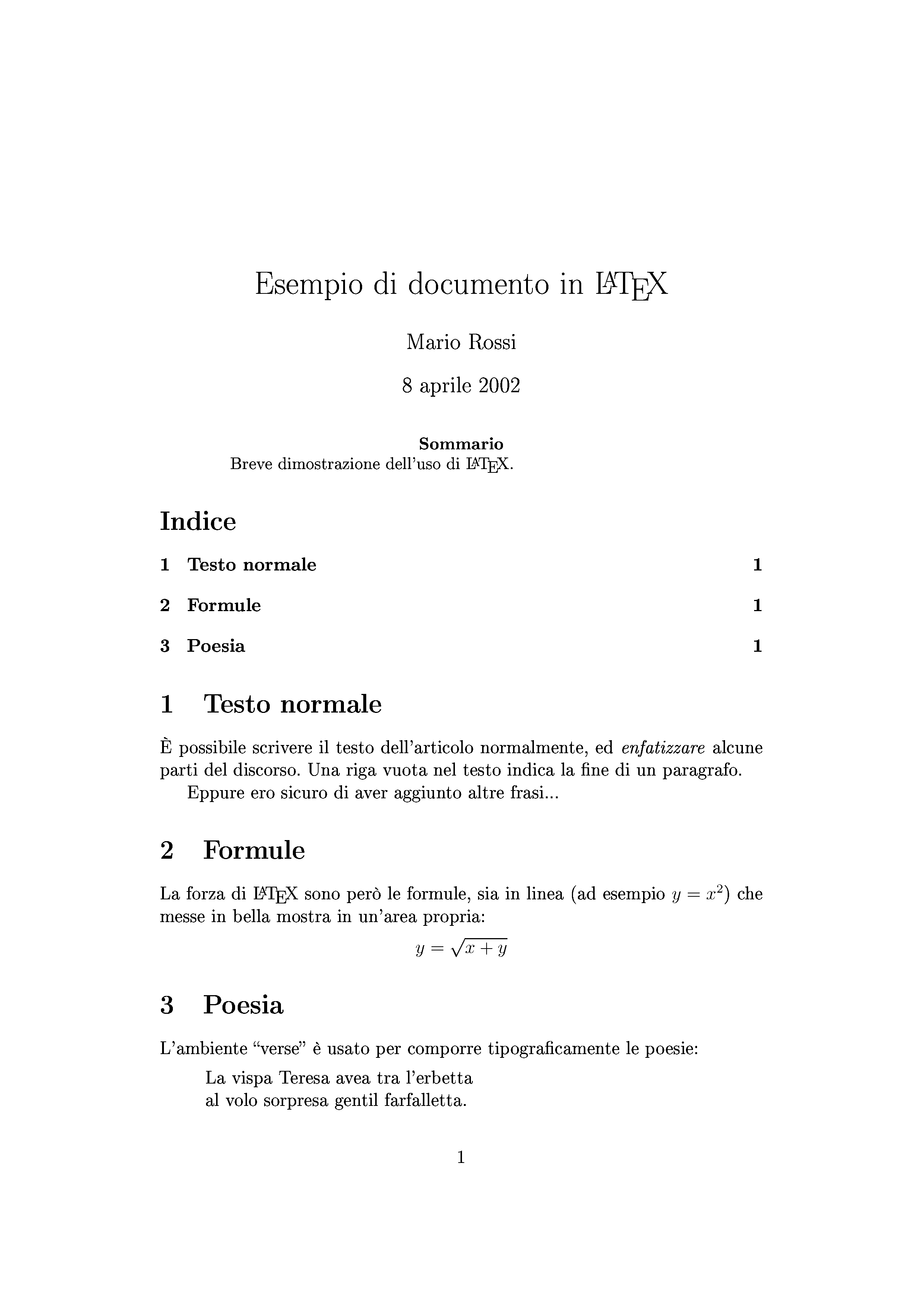 Esempio di documento generato dal sistema di composizione LaTeX. L'immagine è stata generata da me utilizzando come sorgente l'esempio della voce su LaTeX. Mikelima 21:13, 10 giu 2006 (CEST) Categoria:Immagini esclusivamente in GNU FDL